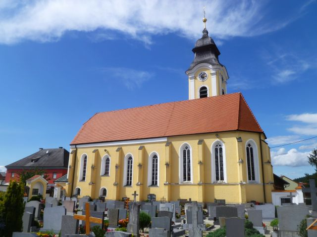 Kath. Pfarrkirche hl. Apostel Andreas, Friedhof mit Friedhofsmauer